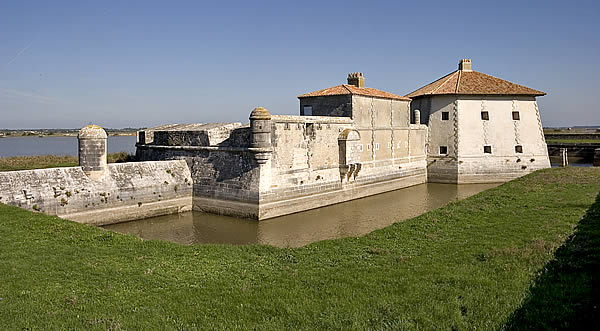 Fort Lupin - Côté sud ouest - Charente-Maritime Photo issue de ma banque d'images : Pep.per 15 octobre 2006 à 00:44 (CEST)